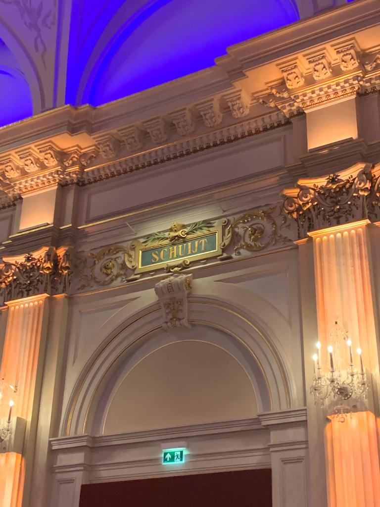 De naam van Cornelis Schuijt, zoals te zien in het Concertgebouw Amsterdam